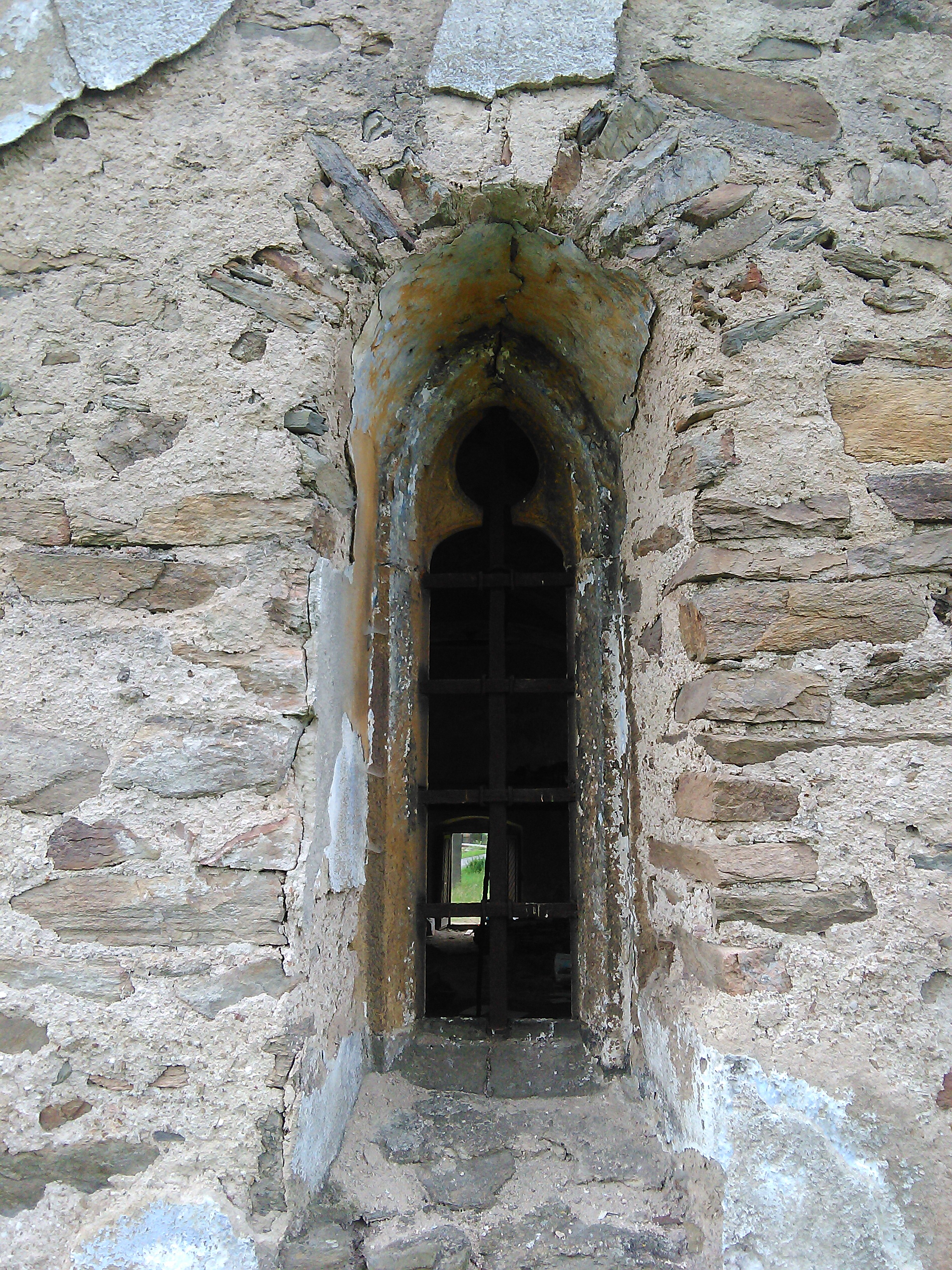 Kostel svatých Petra a Pavla, Volyně (Výsluní), okres Chomutov.